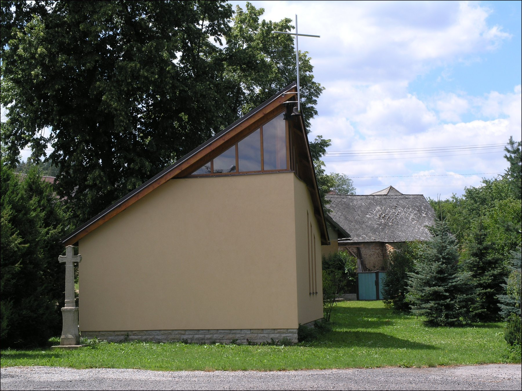 Křepiny (Řečice, okres Pelhřimov)